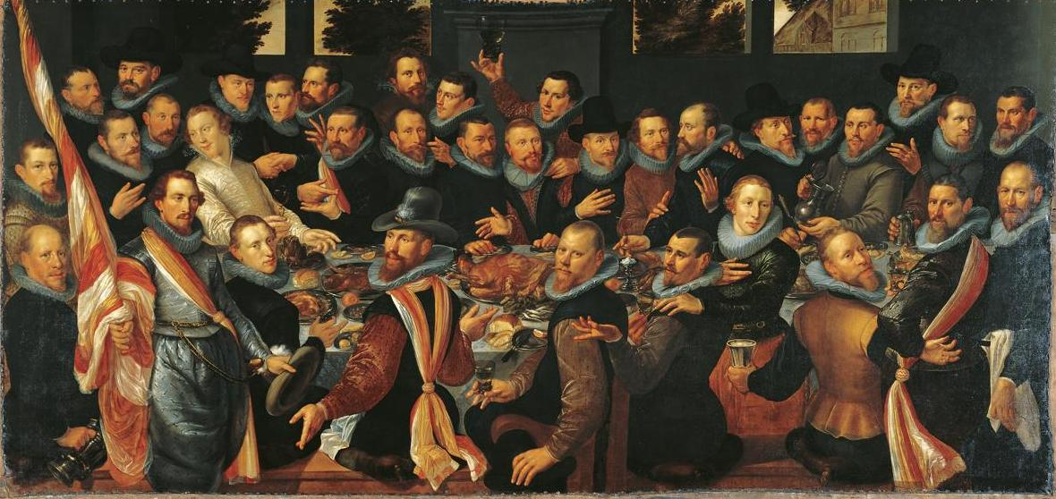 Banquet of a platoon of the Calivermen Civic Guard, Haarlem (1610)label QS:Len,"Banquet of a platoon of the Calivermen Civic Guard, Haarlem (1610)"label QS:Lnl,"Maaltijd van het korporaalschap van de Kloveniersschutterij (Haarlem)"